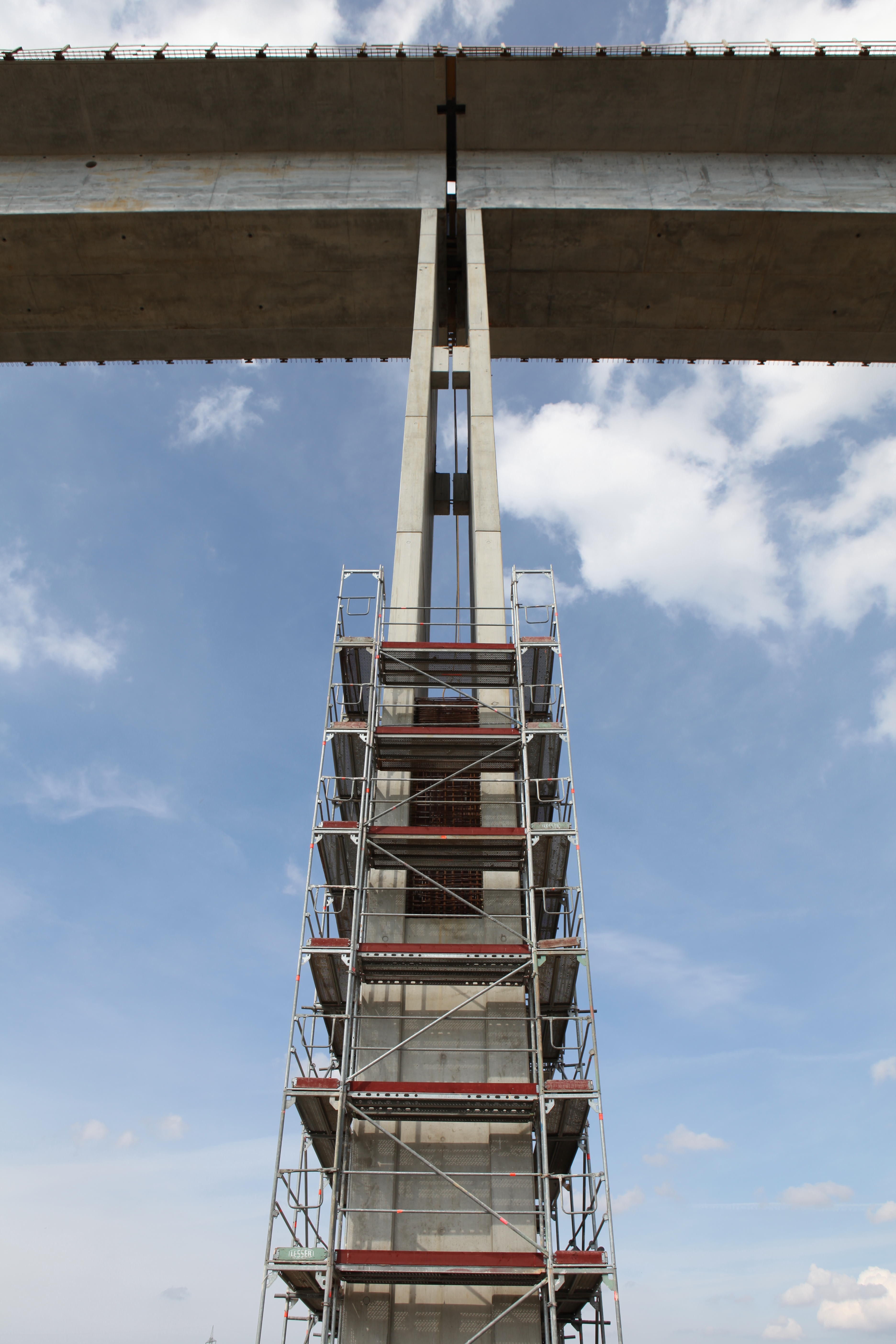 Trennpfeiler der Unstruttalbrücke bei Karsdorf in Sachsen-Anhalt